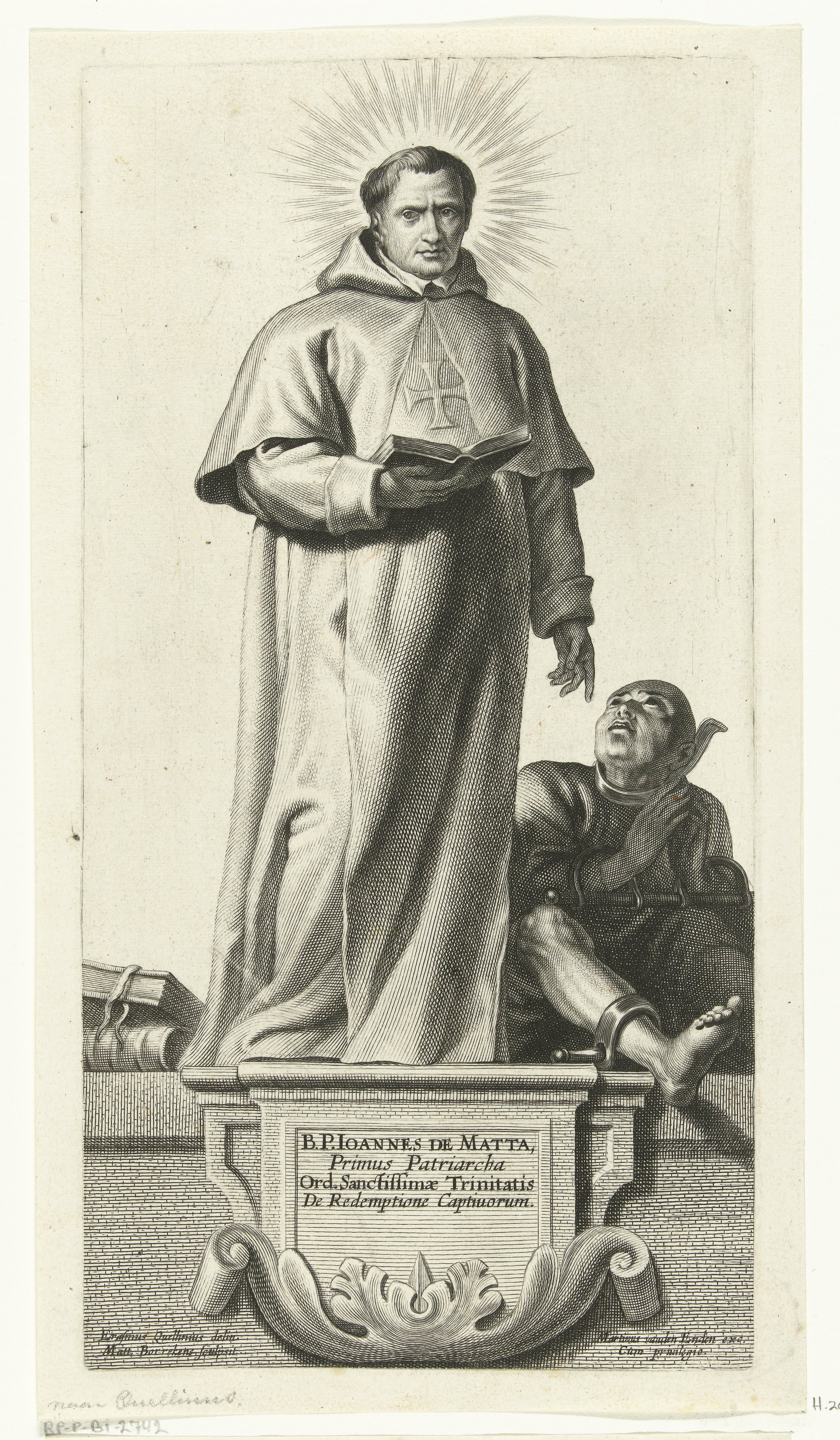 IdentificatieTitel(s): Heilige Johannes van MathaHeiligen (serietitel)Objecttype: prent Objectnummer: RP-P-BI-2742Catalogusreferentie: Hollstein Dutch 20-1(2)Opmerking: 1(2) aan de hand van aanwezige exemplaren RijksmuseumOpschriften / Merken: verzamelaarsmerk, verso linksonder, gestempeld: Lugt 240 of 1838Omschrijving: De Heilige Johannes van Matha, oprichter van de Triniteitsorde. Hij draagt het habijt van deze orde (wit kleed met blauw kruis). In zijn handen een boek. Rond zijn hoofd een aureool. Aan zijn voeten links liggen enkele andere boeken. Rechts van hem zit een geketende gevangene die hoopvol naar hem op kijkt. De prent heeft een Latijns onderschrift in een cartouche.VervaardigingVervaardiger: prentmaker: Mattheus Borrekens (vermeld op object)naar tekening van: Erasmus Quellinus (I) (vermeld op object)uitgever: Martinus van den Enden (vermeld op object)opgedragen aan: Augustino Boyen (vermeld op object)Datering: 1644Fysieke kenmerken: gravureMateriaal: papier Techniek: graveren (drukprocedé)Afmetingen: plaatrand: b 135 mm × h 264 mmOnderwerpWat: the founder of the Order of the Trinity, John of Matha; possible attributes: (broken) chains, prisonersprisoner with hands boundVerwerving en rechtenVerwerving: overdracht van beheer 1816Copyright: Publiek domein